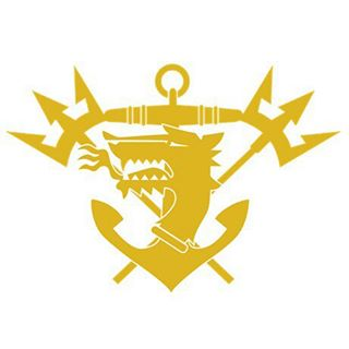 Kystjegerkommandoens logo